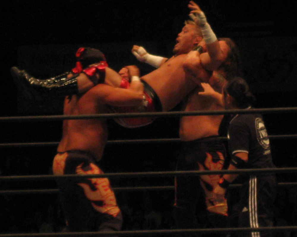 2013年11月9日 大阪府立体育会館 「POWER STRUGGLE」 天山広吉にキラーボムを仕掛けるK.E.S.（ランス・アーチャー & デイビーボーイ・スミスJr.）